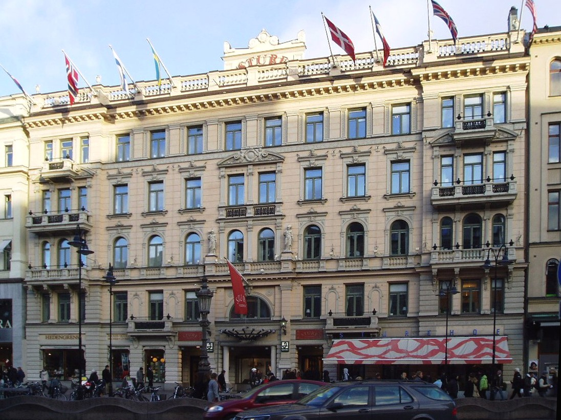 Sturegallerian, Östermalm, Stockholm